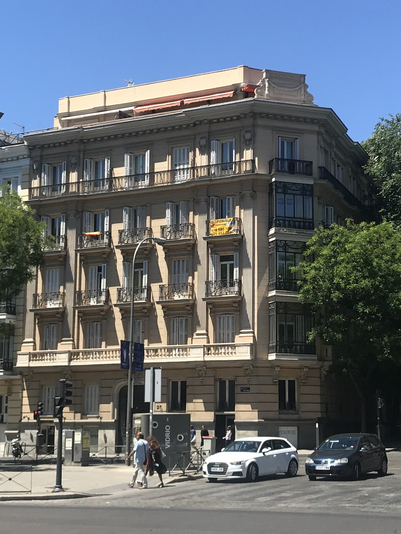 Viviendas para D. Luis Mitjans